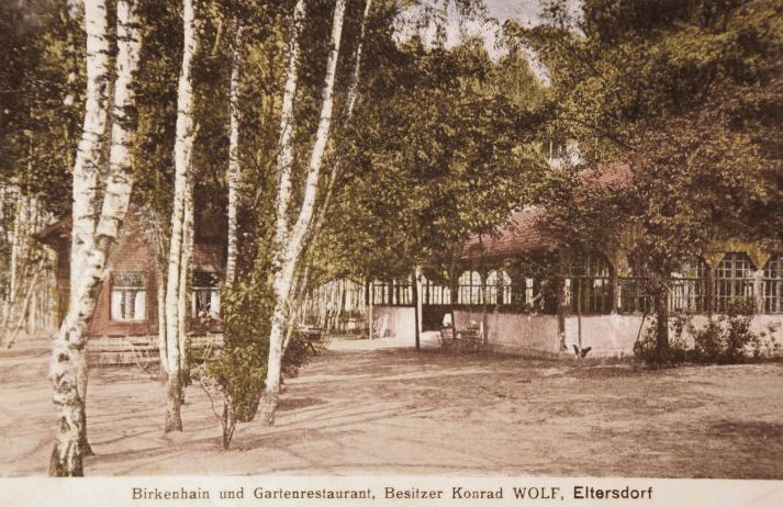 Birkenhain und Gartenrestaurant Zum schwarzen Adler, Besitzer Konrad Wolf, Eltersdorf